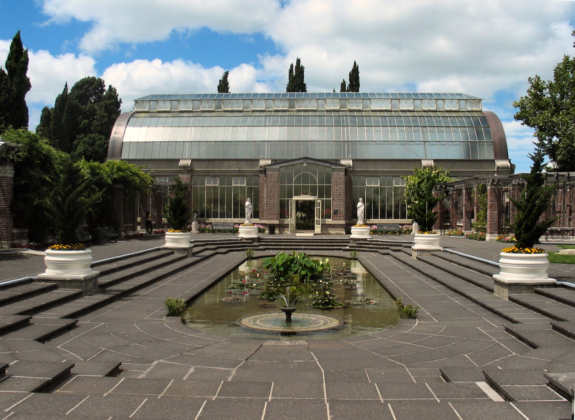 Winter Gardens, Auckland Domain, Auckland, New Zealand